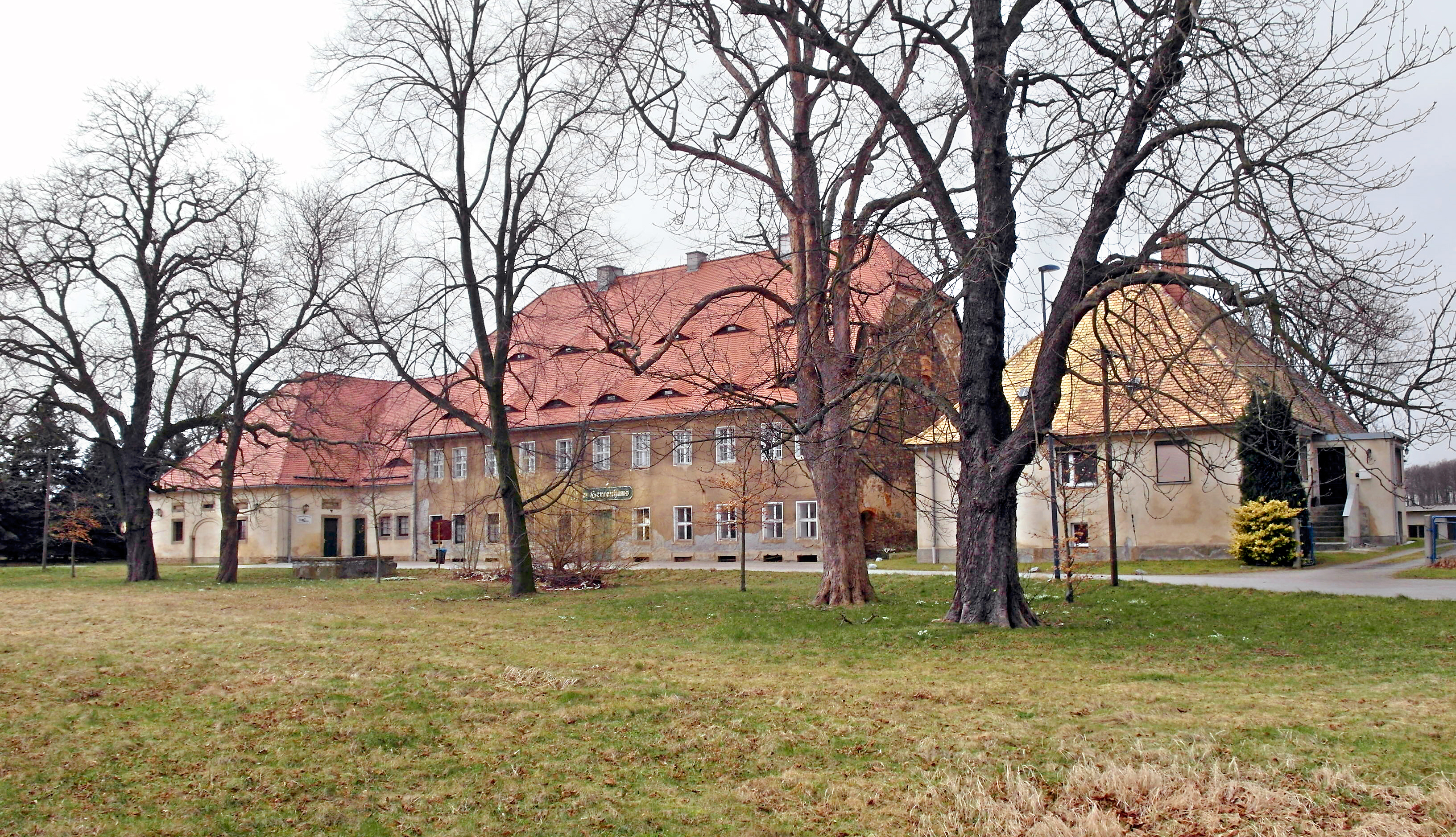 16.03.2017 02627 Nostitz (Weißenberg): Herrenhaus im Rittergut Nostitz. Es wurde auf Geheiß der Gräfin Johanna Wilhelmine Gottliebe von Bressler an einem neuen Standort am Ortsrand erbaut, nachdem September 1813 das bisherige Schloß von französischen Truppen in Brand gesetzt worden war. Nach 1945 nutzte die Gemeindeverwaltung bis 1990 das Herrenhaus, das anschließend lange leer stand, bis es in den Besitz des Heimatvereins Nostitz überging. Dieser veranlasste eine denkmalgerechte Dach- und Fassadensanierung. 2006 wurde das Herrenhaus als Dorfzentrum wiedereröffnet. Im Erdgeschoss des Herrenhauses befindet sich die Gaststätte "Altes Herrenhaus", Doch die ist schon wieder ge- schlossen. [SAM8403.JPG]20170316100DR.JPG(c)Blobelt